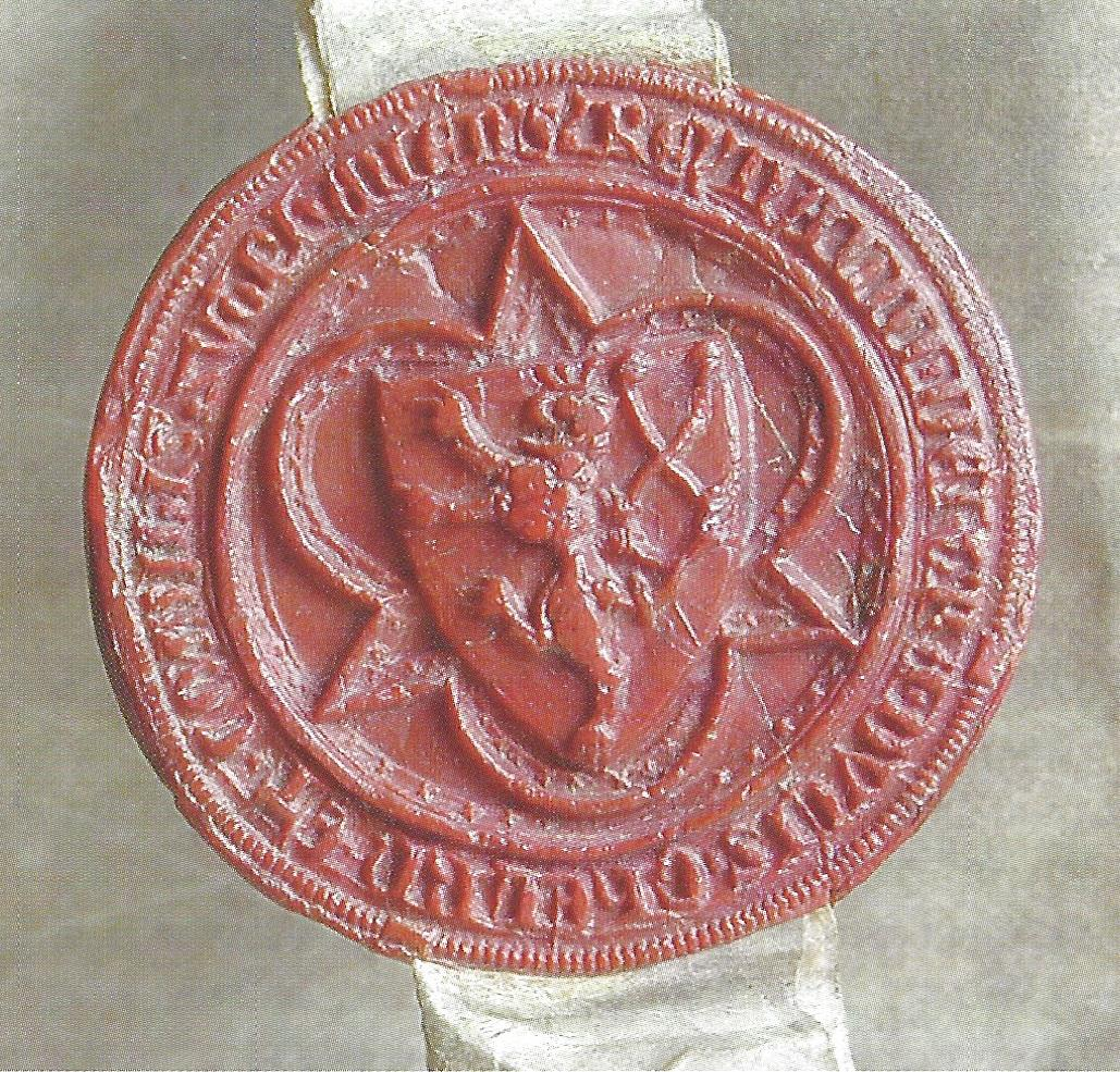 Reinald III van Gelre. Eerste zegel, gebruikt van 20 sep 1344 tot 6 juli 1349